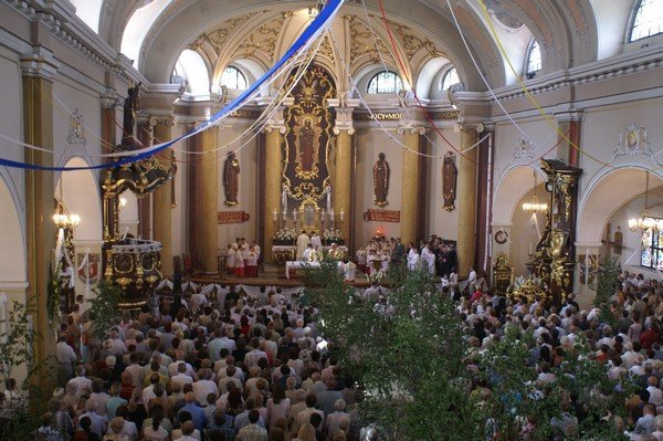 Kościół Matki Bożej Nieustającej Pomocy w Bydgoszczy